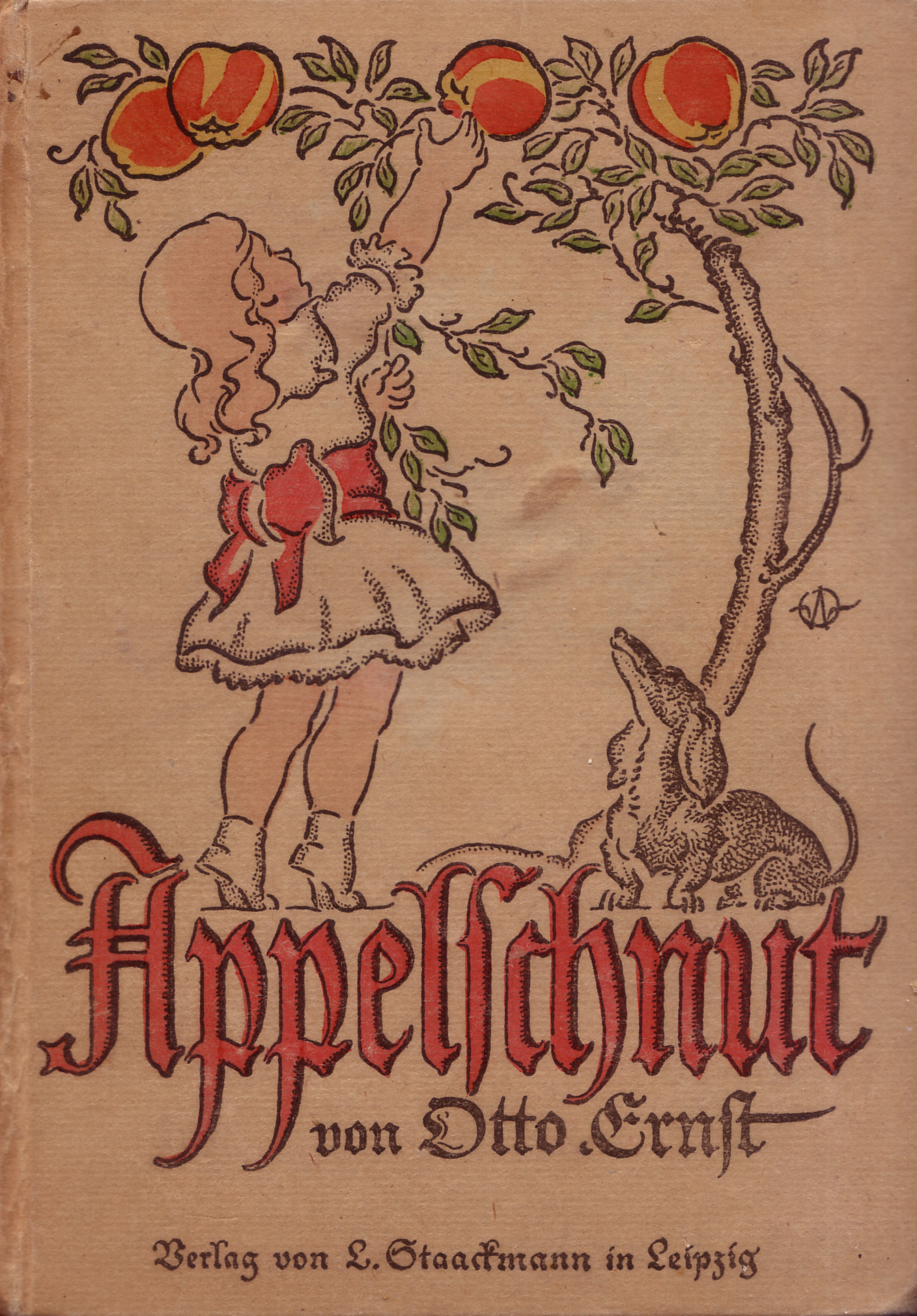 Cover of Otto Ernst: "Appelschnut." Staakmann Leipzig 1907